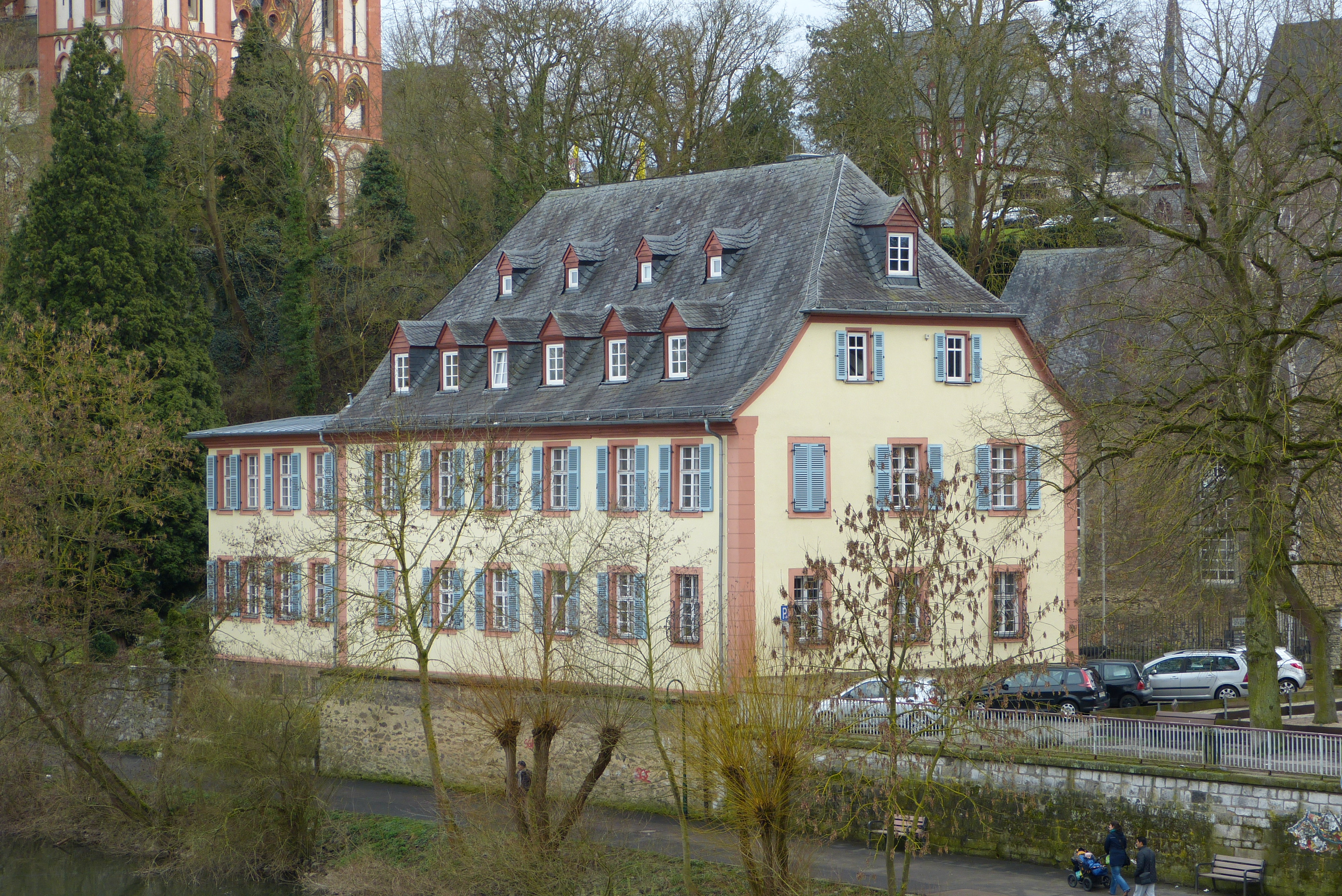 Limburg an der Lahn, Hessen, Deutschland. Erbacher Hof, Blick von der Alten Lahnbrücke